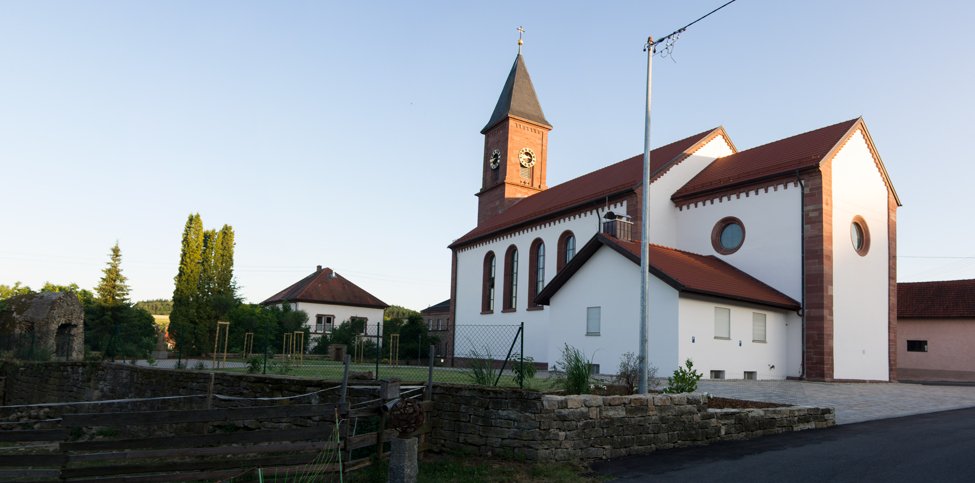 Nord und Ost Seite von St. Kilian Links davon die Mariengrotte